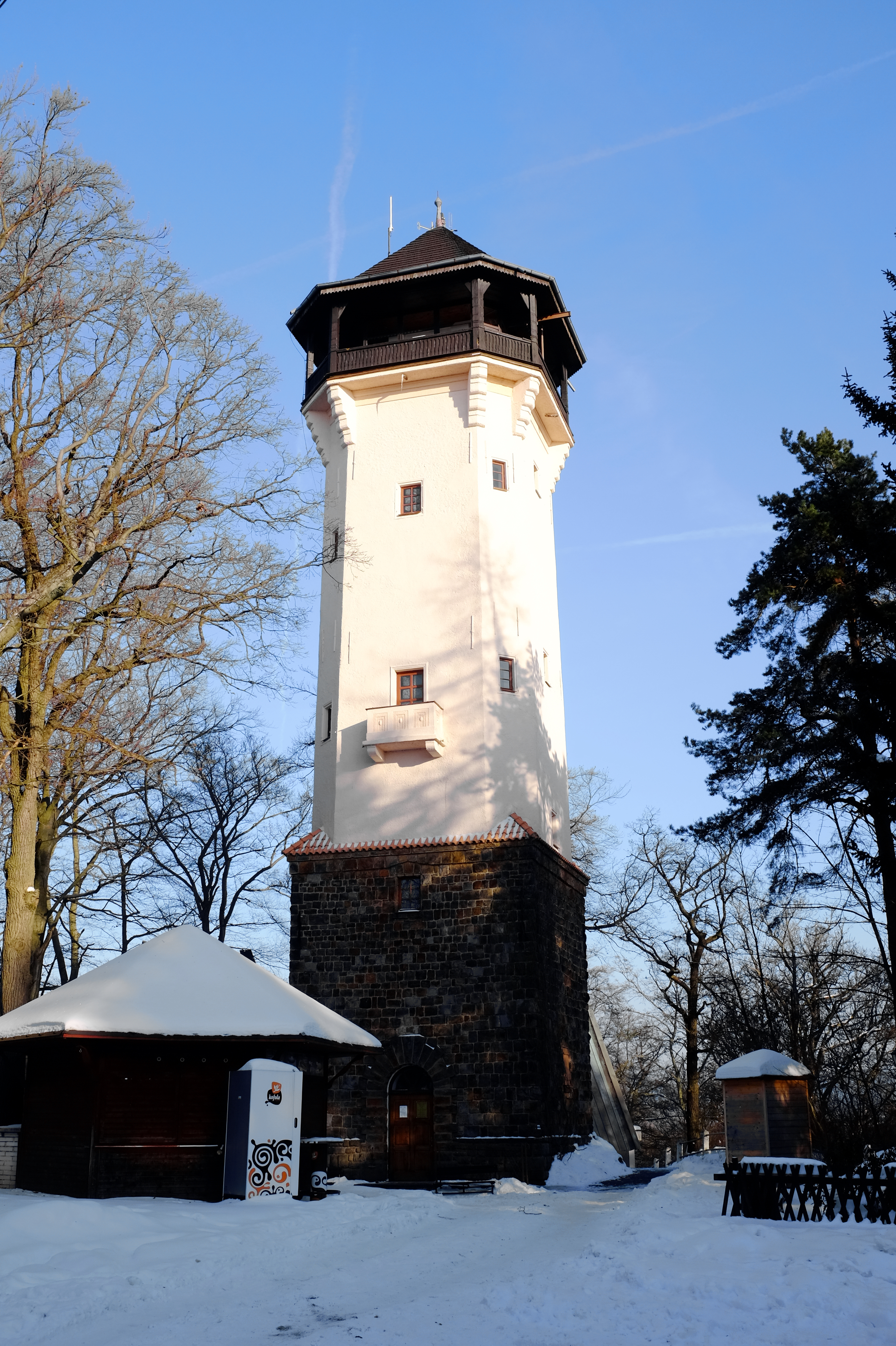 Vyhlídka Diana, Vrch přátelství, Karlovy Vary.